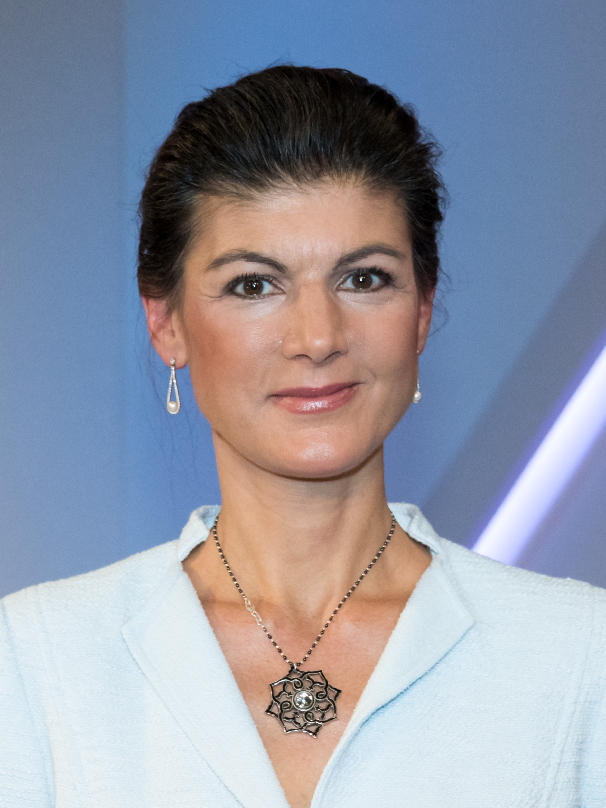 „maischberger. die woche“ am 13. November 2019 in Köln. Produziert vom WDR. Foto: Sahra Wagenknecht, Die Linke (ehemalige Fraktionsvorsitzende)